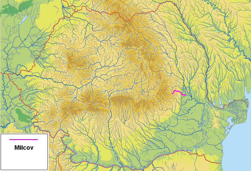 Milcov river in Romania